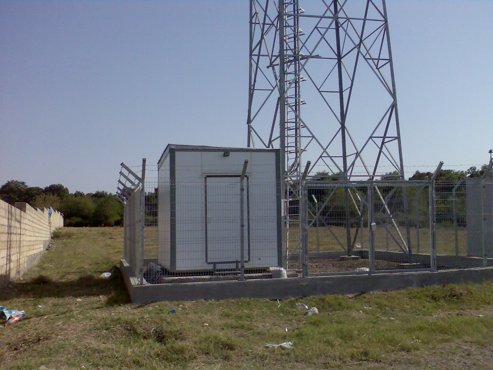 Azercell GSM Station- Gakh Region,Susken Village